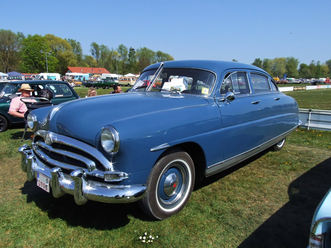 Hudson Pacemaker Baujahr 1952, elbst fotografiert